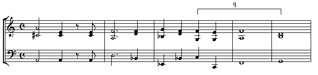 GNU-FDL, selbst erstellt